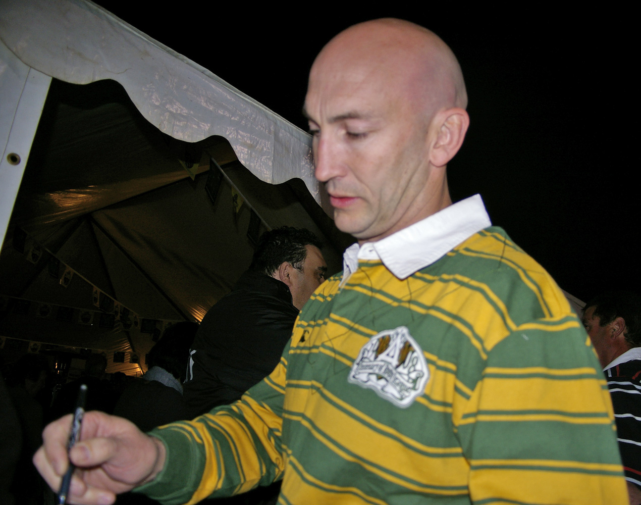 David Barnhill